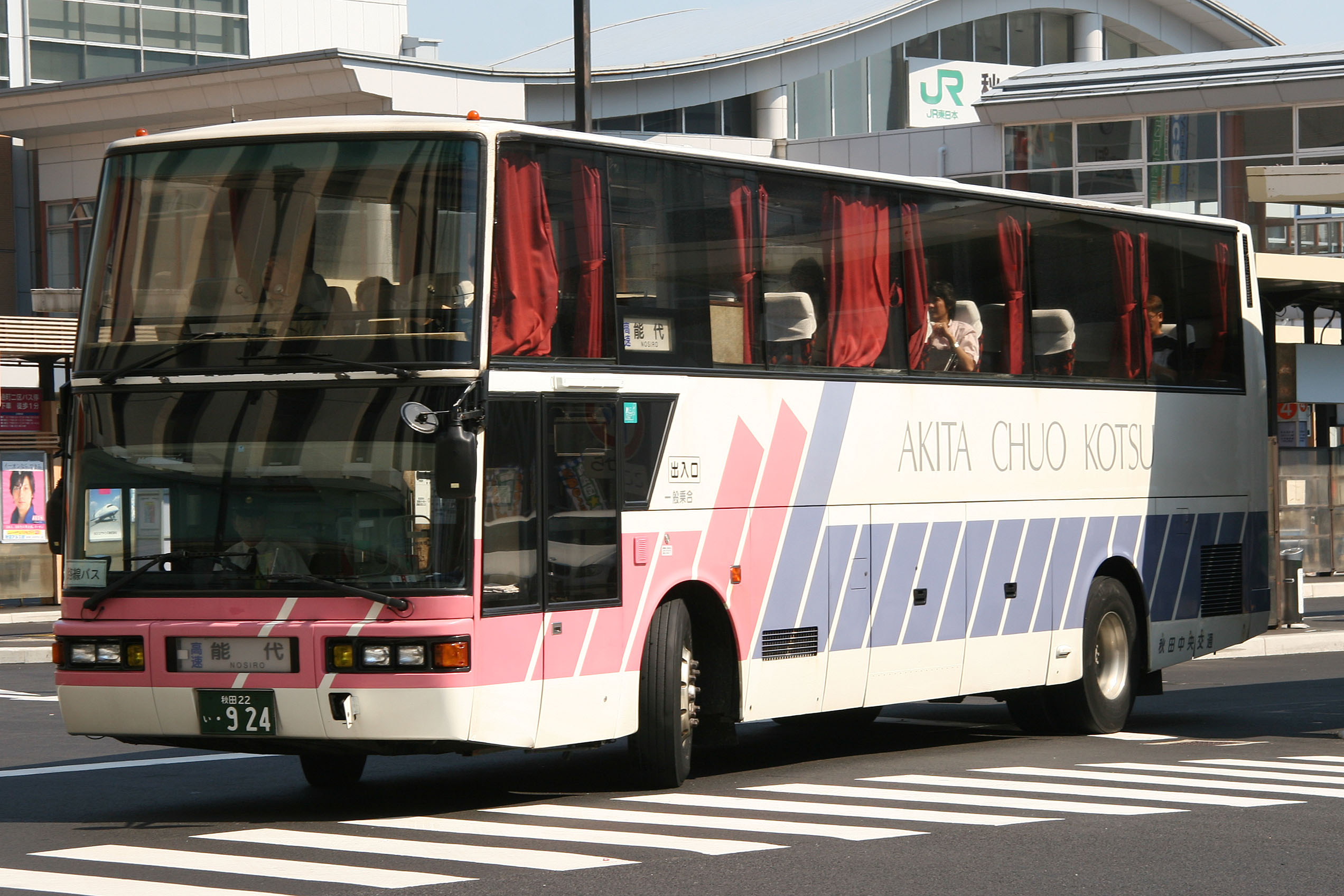 Akita Chuo Kotsu car 秋田中央交通の車両